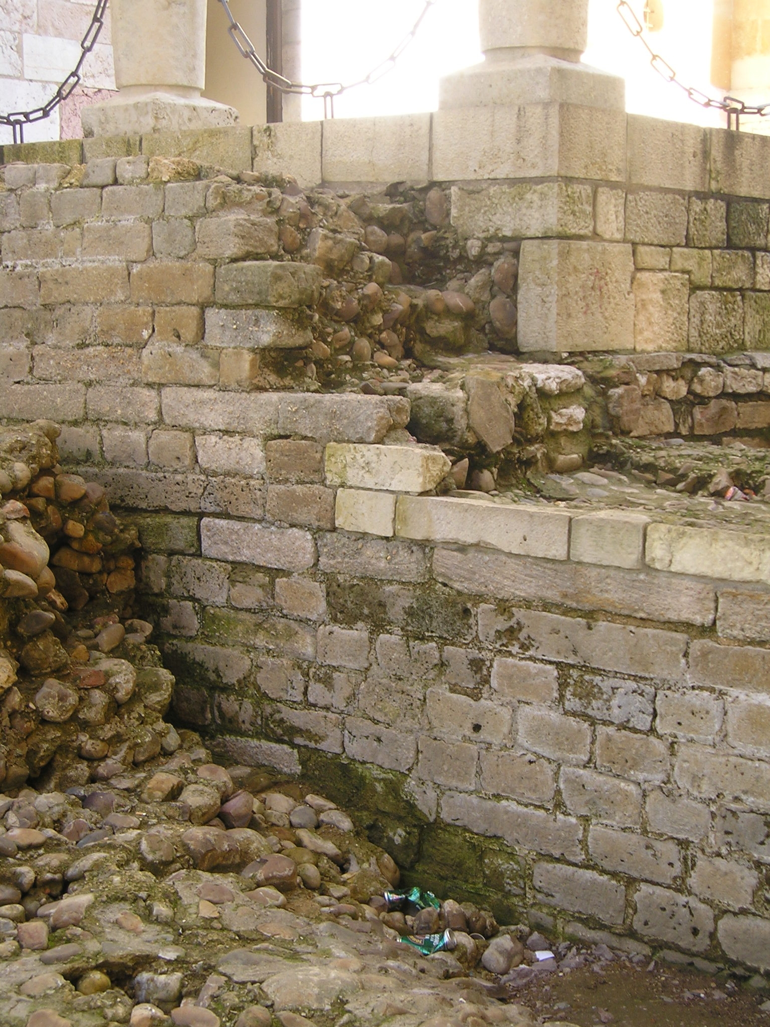 Muralla Altoimperial del campamento de Legio VII Gemina, actual León (España) sobre la que fue adosada la muralla Bajoimperial y la muralla medieval.